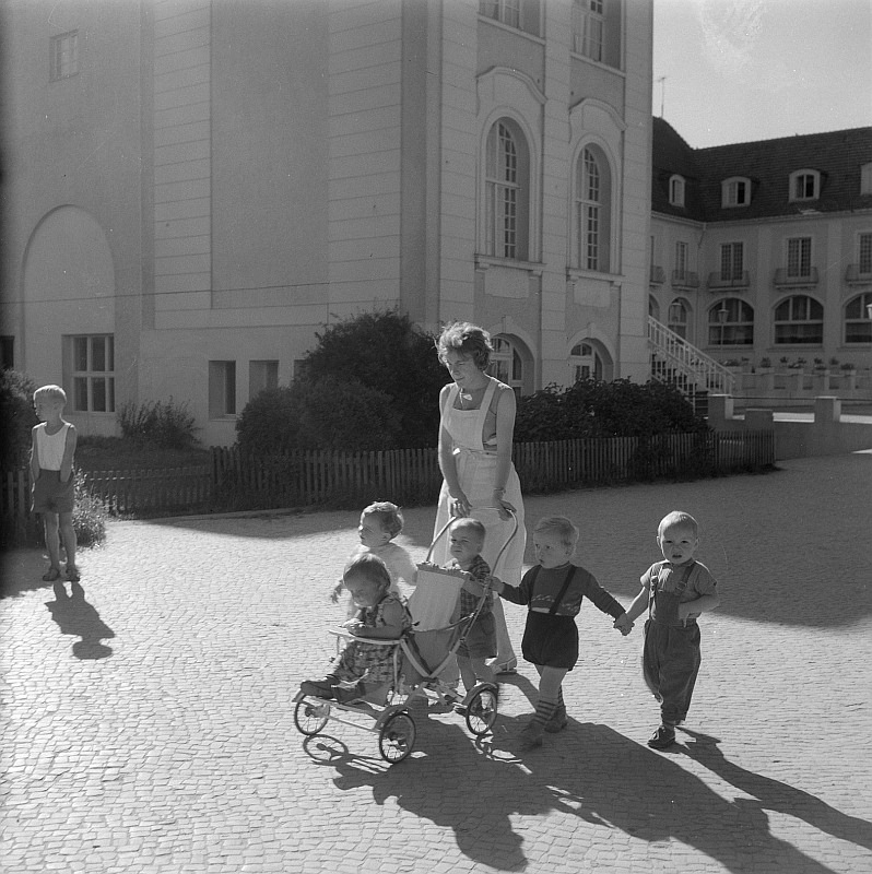 Original image description from the Deutsche FotothekBinz. Kindergärtnerin mit Kindern vor dem Kurhaus